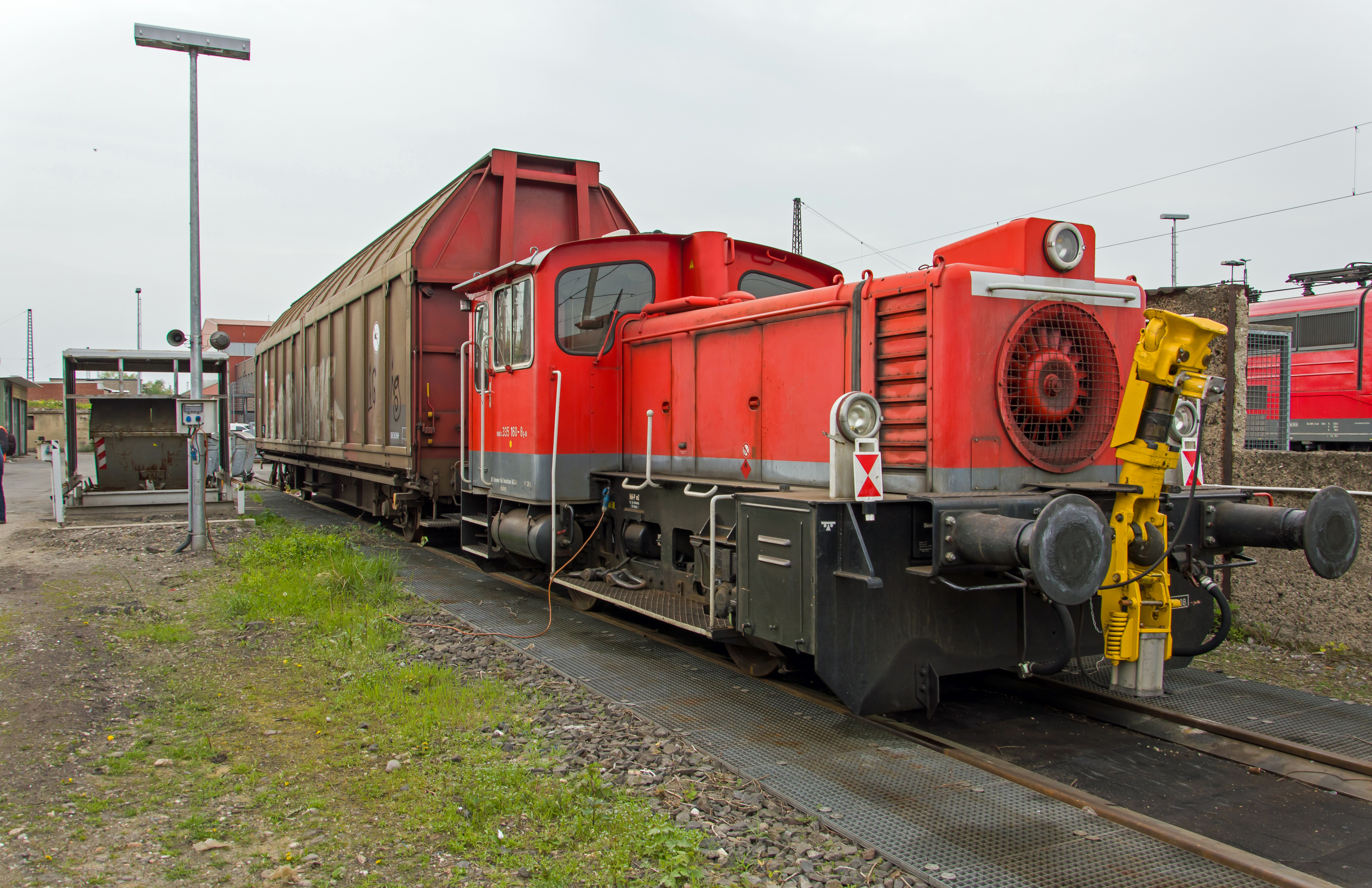 Op bezoek bij DB Schenker op Oberhausen Osterfeld, was er veel bijzonder materieel te zien. Eén van de locs die er stond was deze lage 335 160-8 uit 1974 eerst in dienst bij DB, vanaf 2003 bij Railion en sinds 2009 bij DB Schenker (Ladungsverkehr).